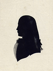 Schattenriss des Juristen Christian von Schlözer